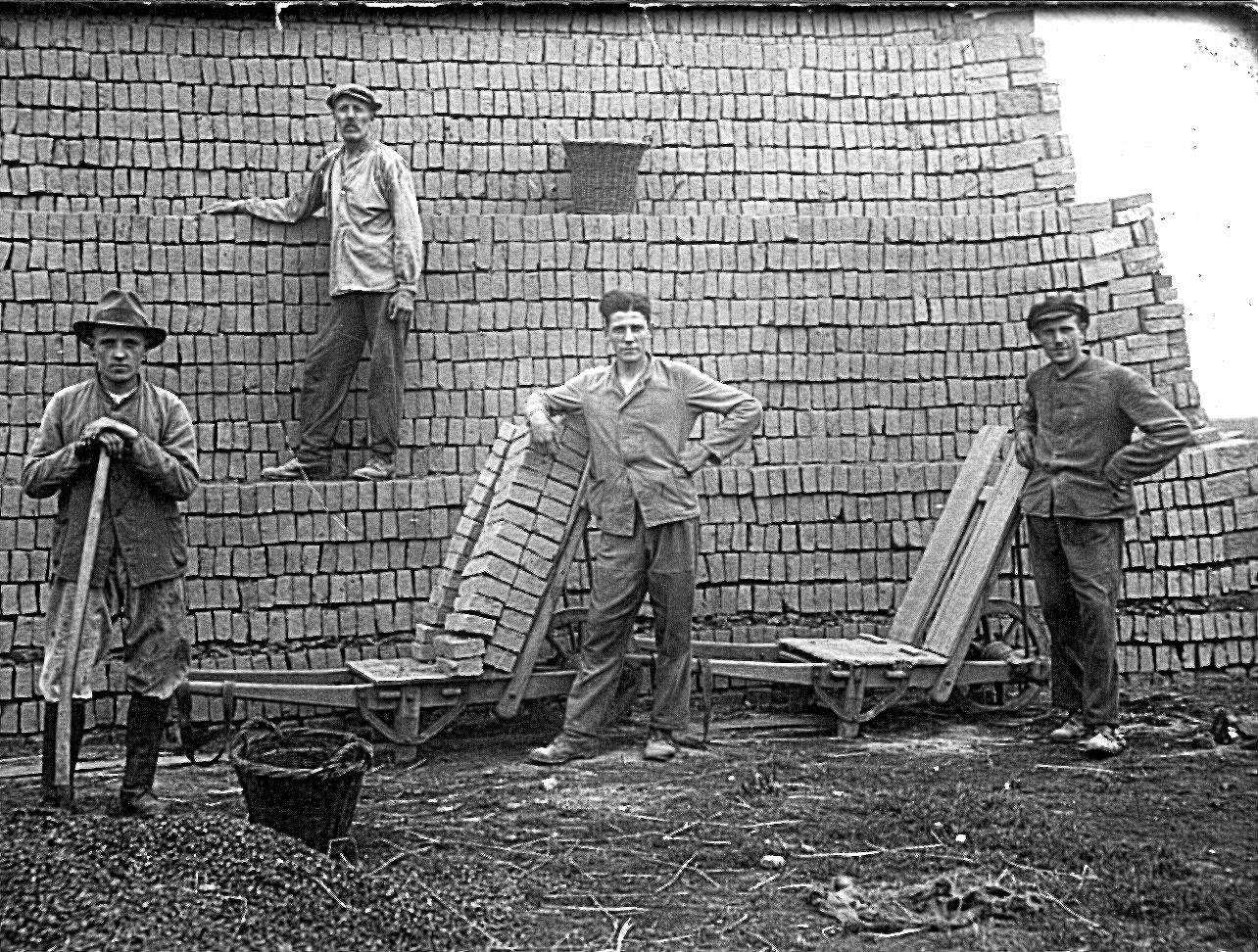 Aufgeschichteter Rohziegelmeiler der Fa. Gebrüder Neff im Niederkasseler Feld um 1915